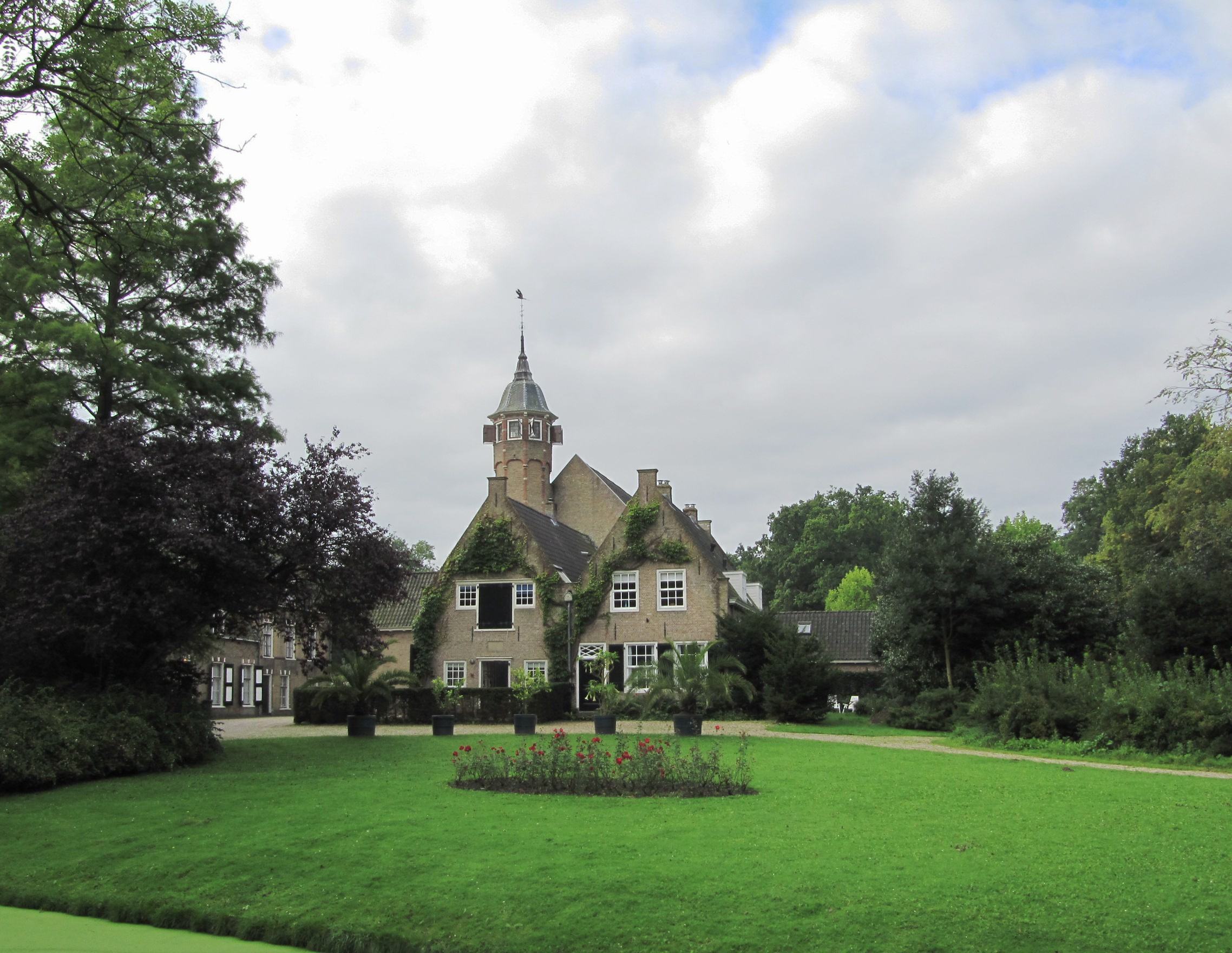 RM497175 Dordwijk - kasteelboerderij (foto 1).jpg